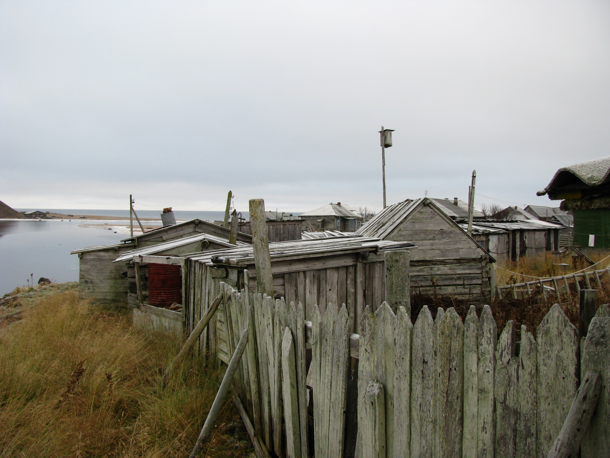 Устье Чапомы